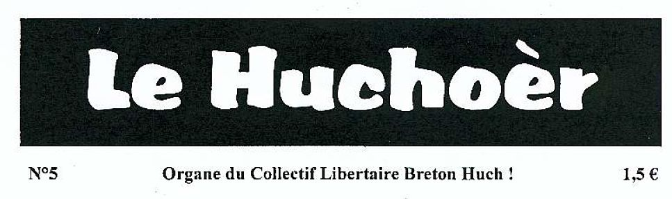 LOGO Le Huchoèr - Coordination Bretagne indépendante et libertaire